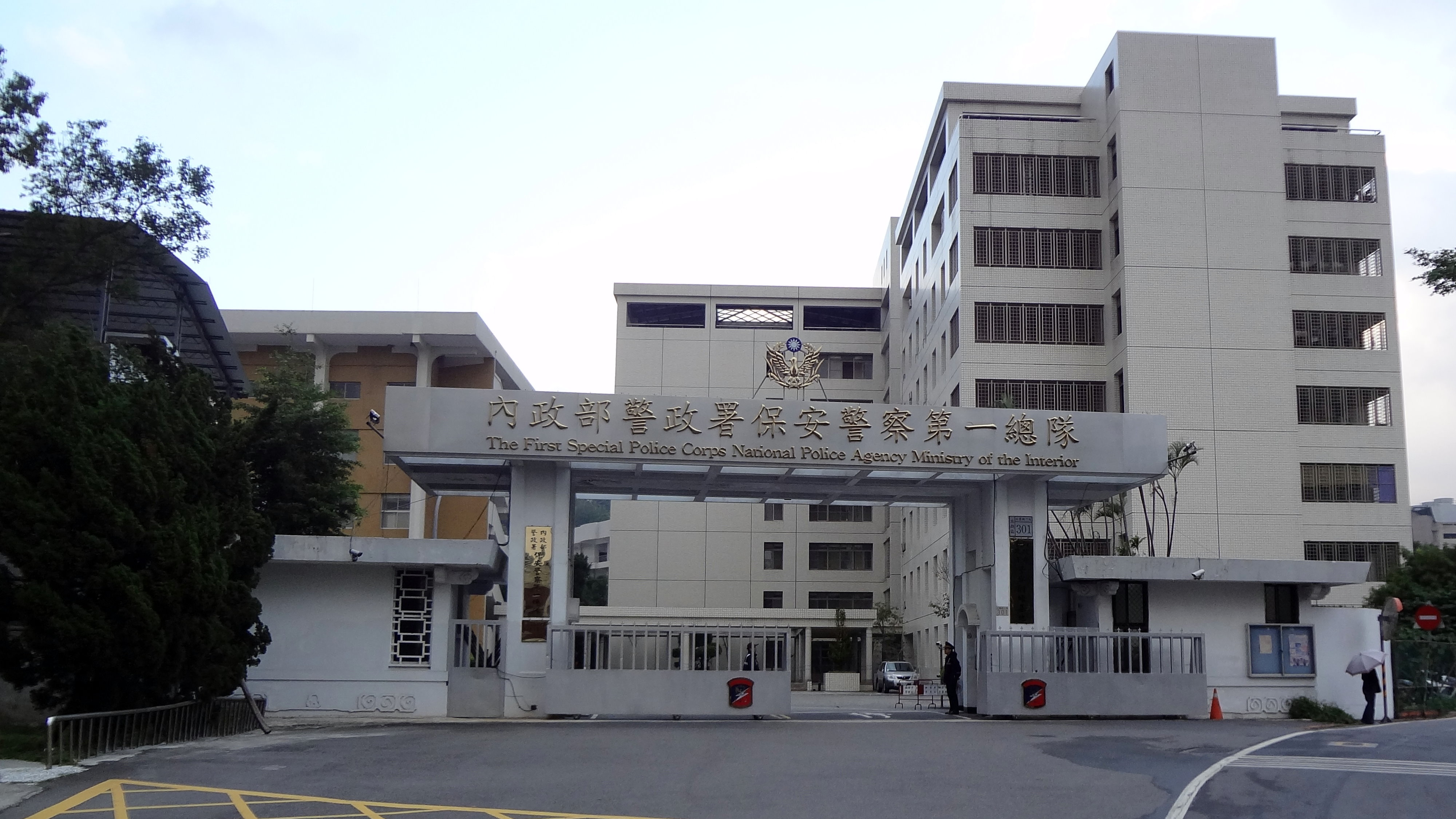 內政部警政署保安警察第一總隊總隊部，位於臺北市北投區立農街二段301號。